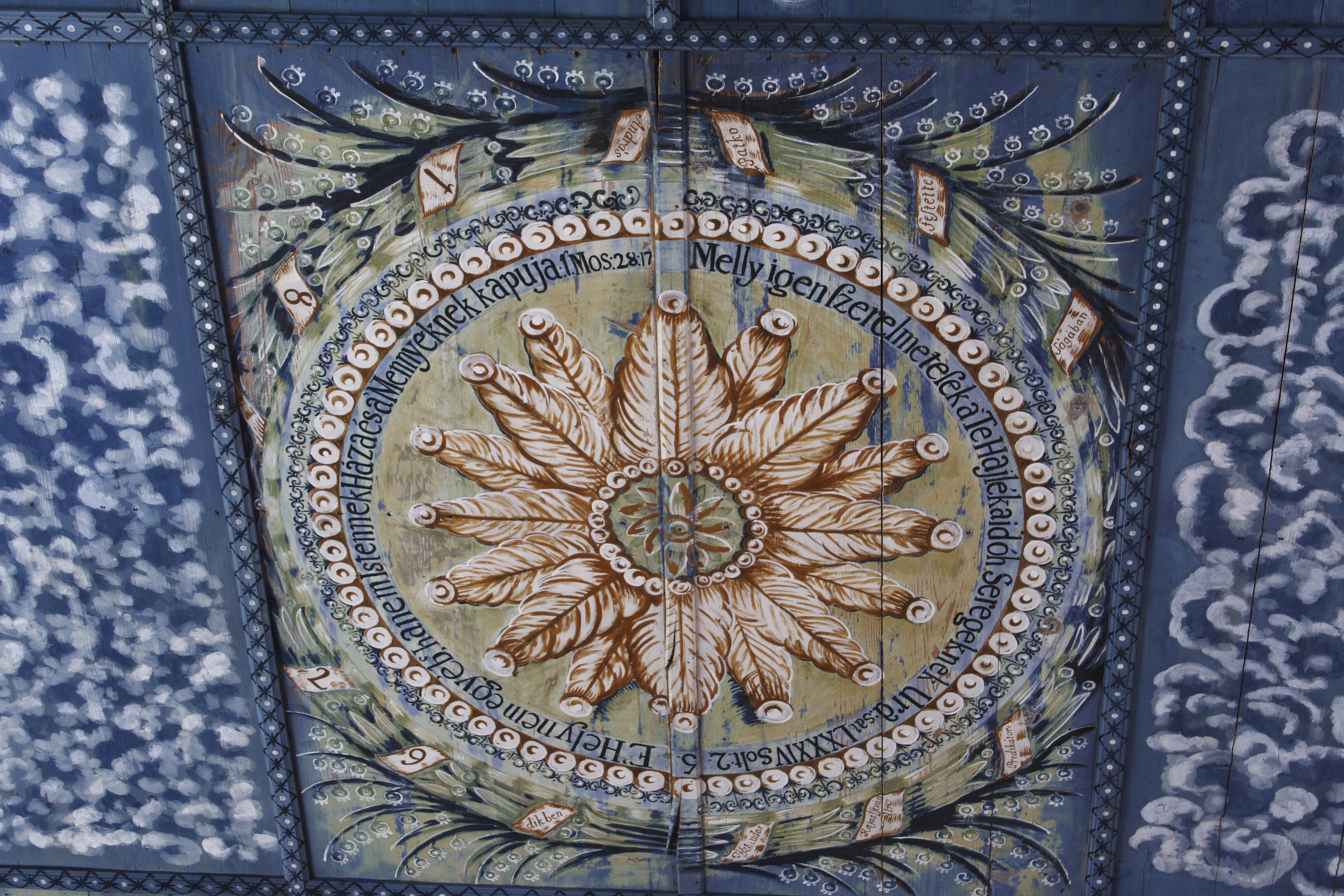 Szentgyörgyvölgy templomában található kazettás mennyezet